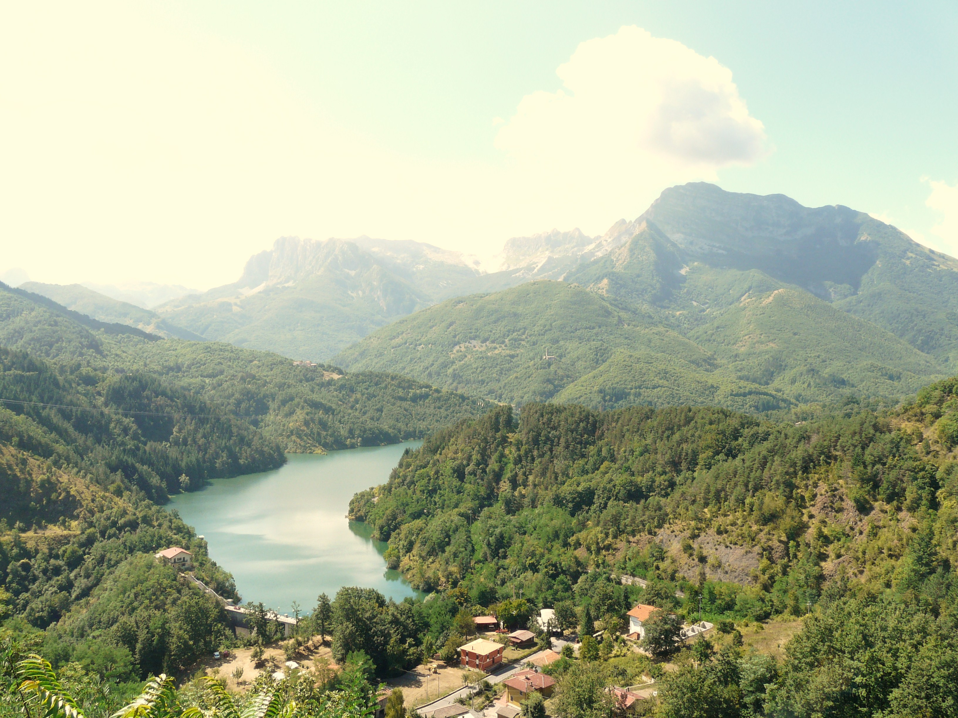 Vista del lago di Gramolazzo dalla frazione di Castagnola, Minucciano, Toscana, Italia